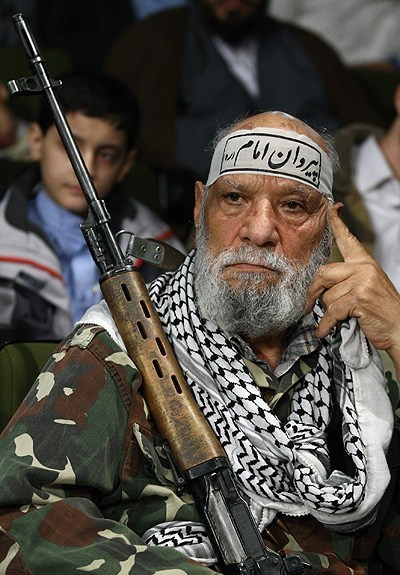 حاجی بخشی